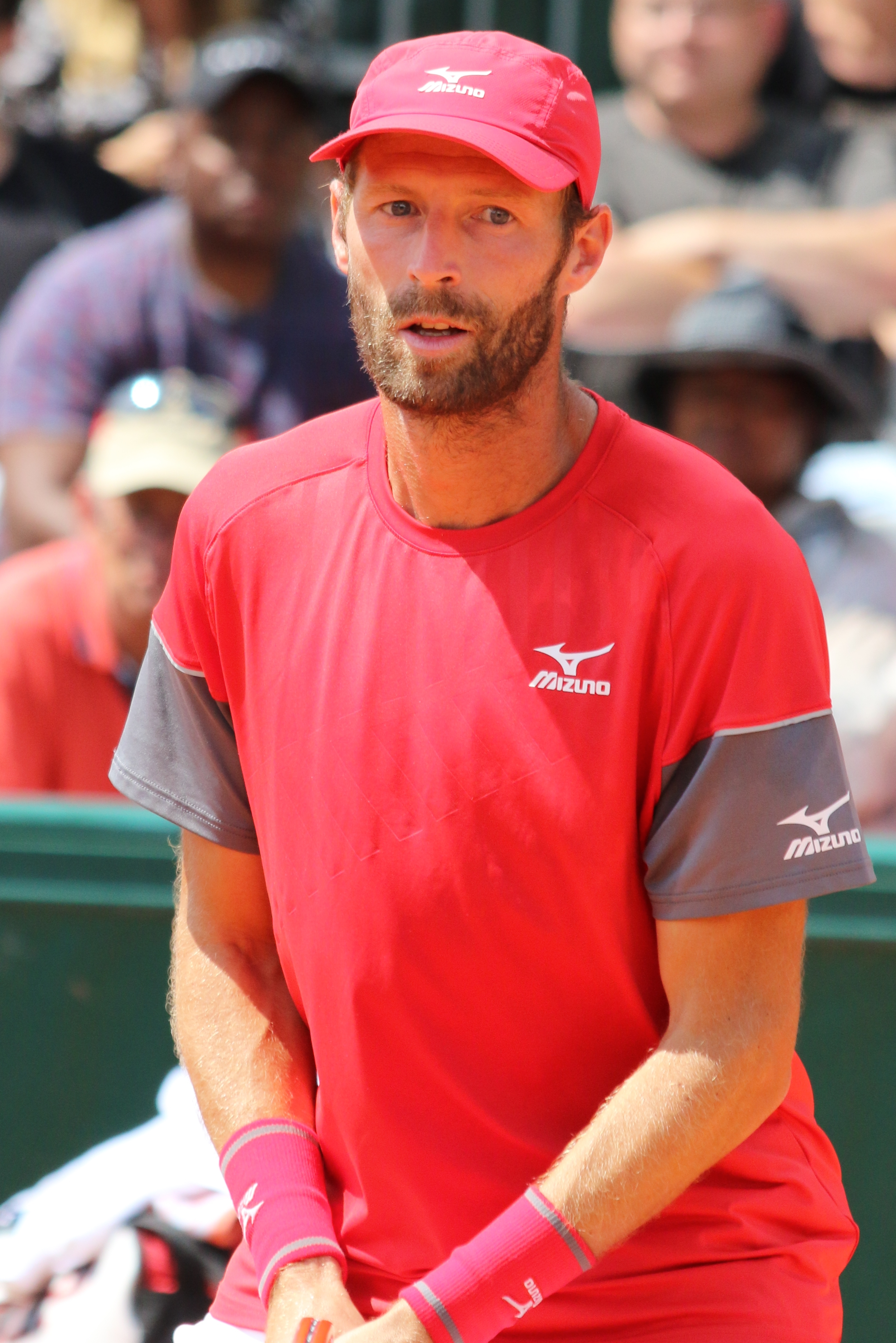 Robert RG18 (1)